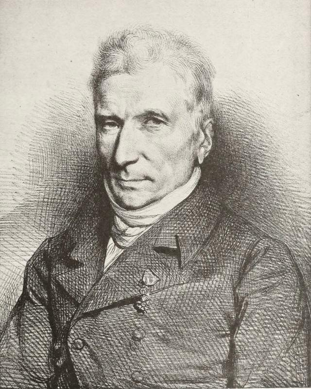 A.J.B. Guy de Gisors